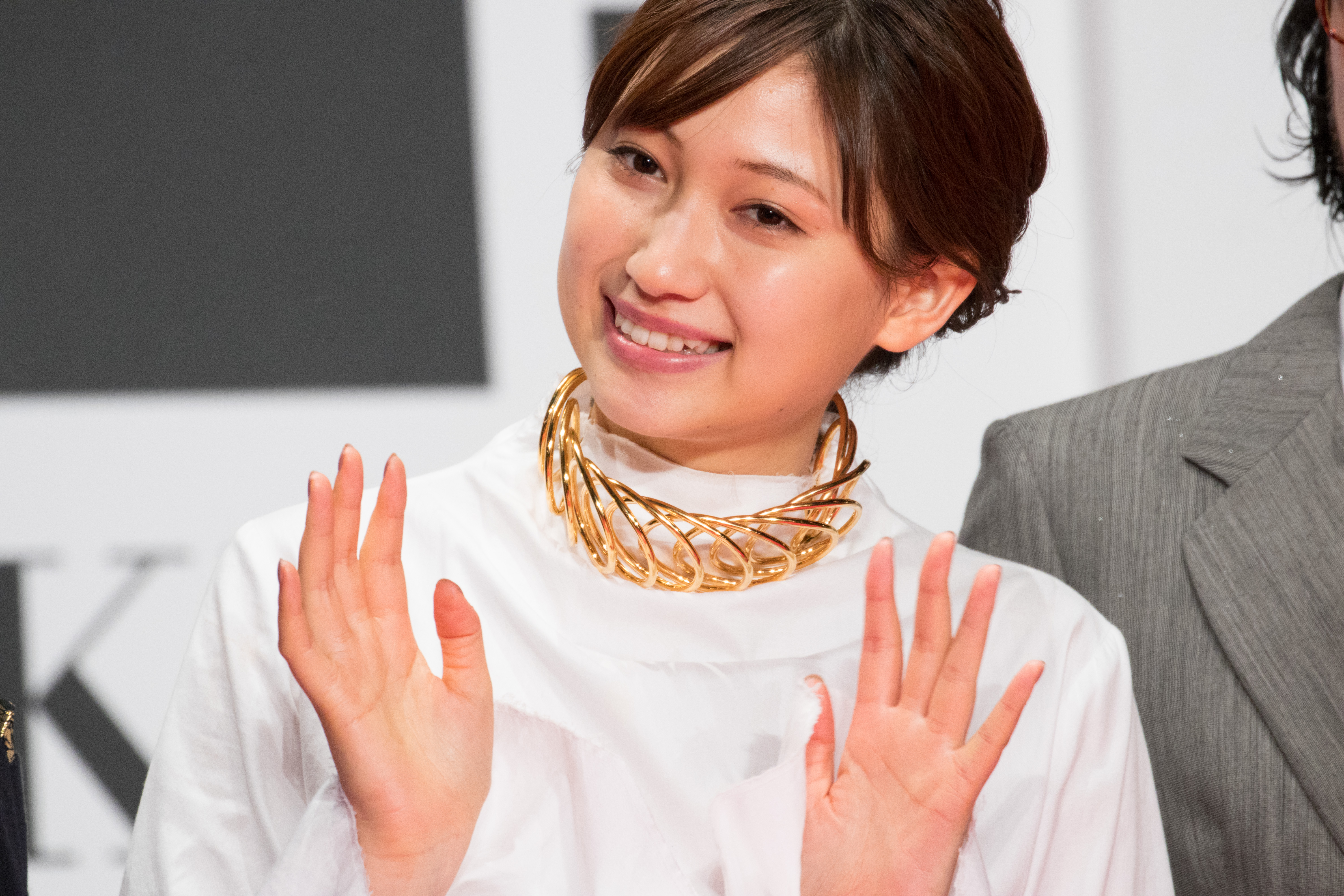 第29回 東京国際映画祭 オープニングセレモニー 大野いと (雨にゆれる女)